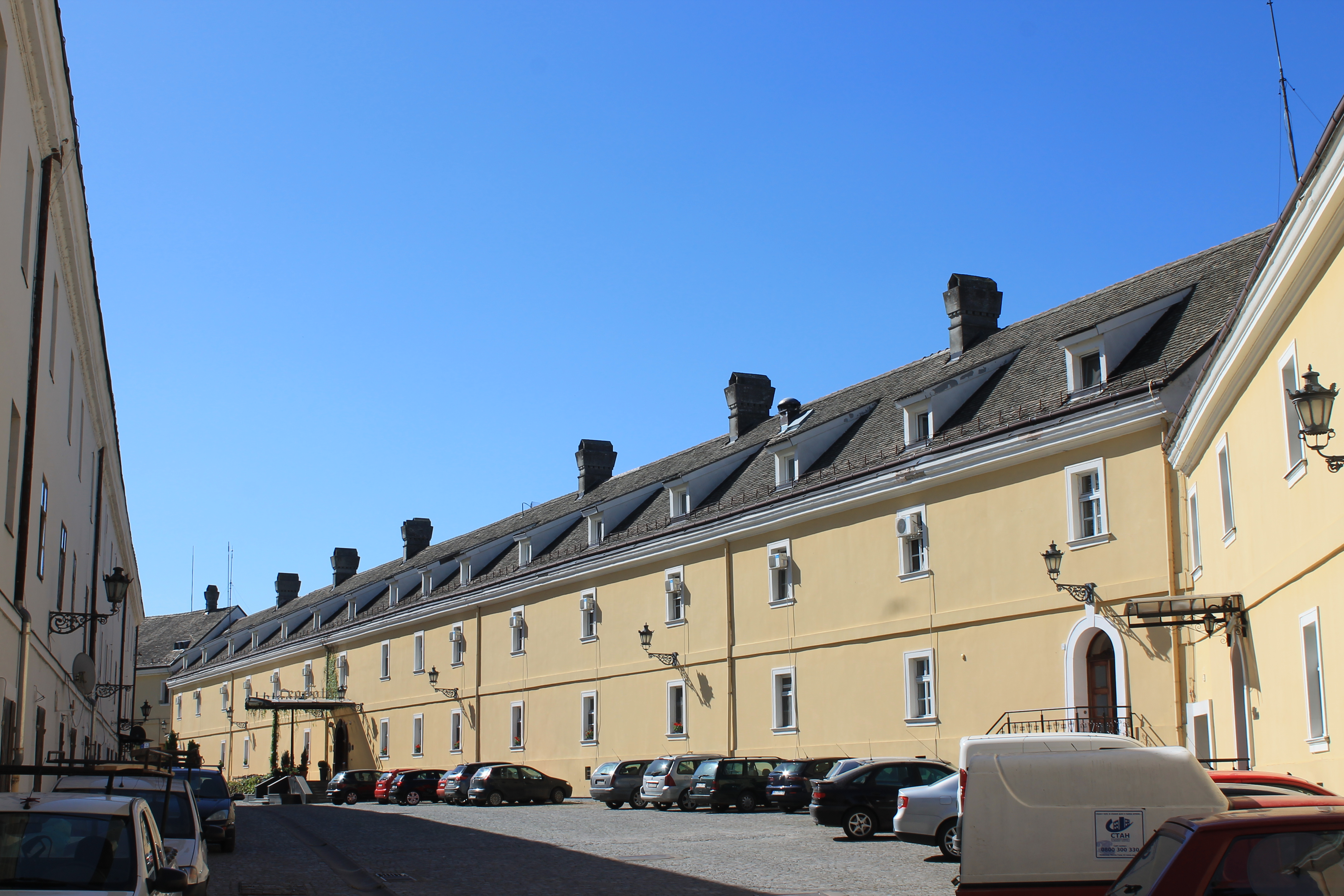 Petrovaradinska tvrđava